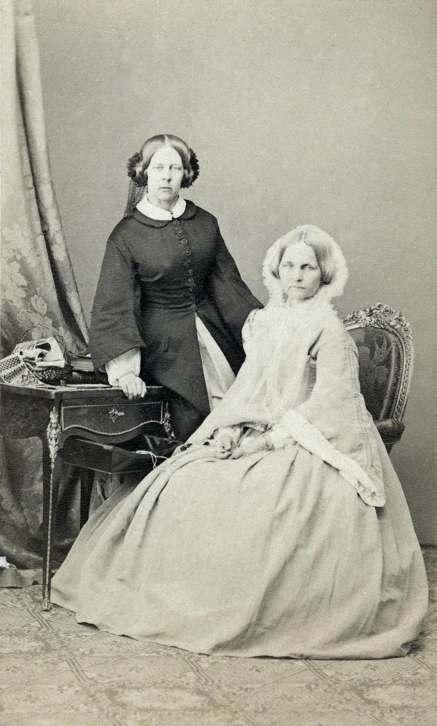 Bildnis (ganze Figur sitzend, leicht links) zusammen mit ihrer Tochter.